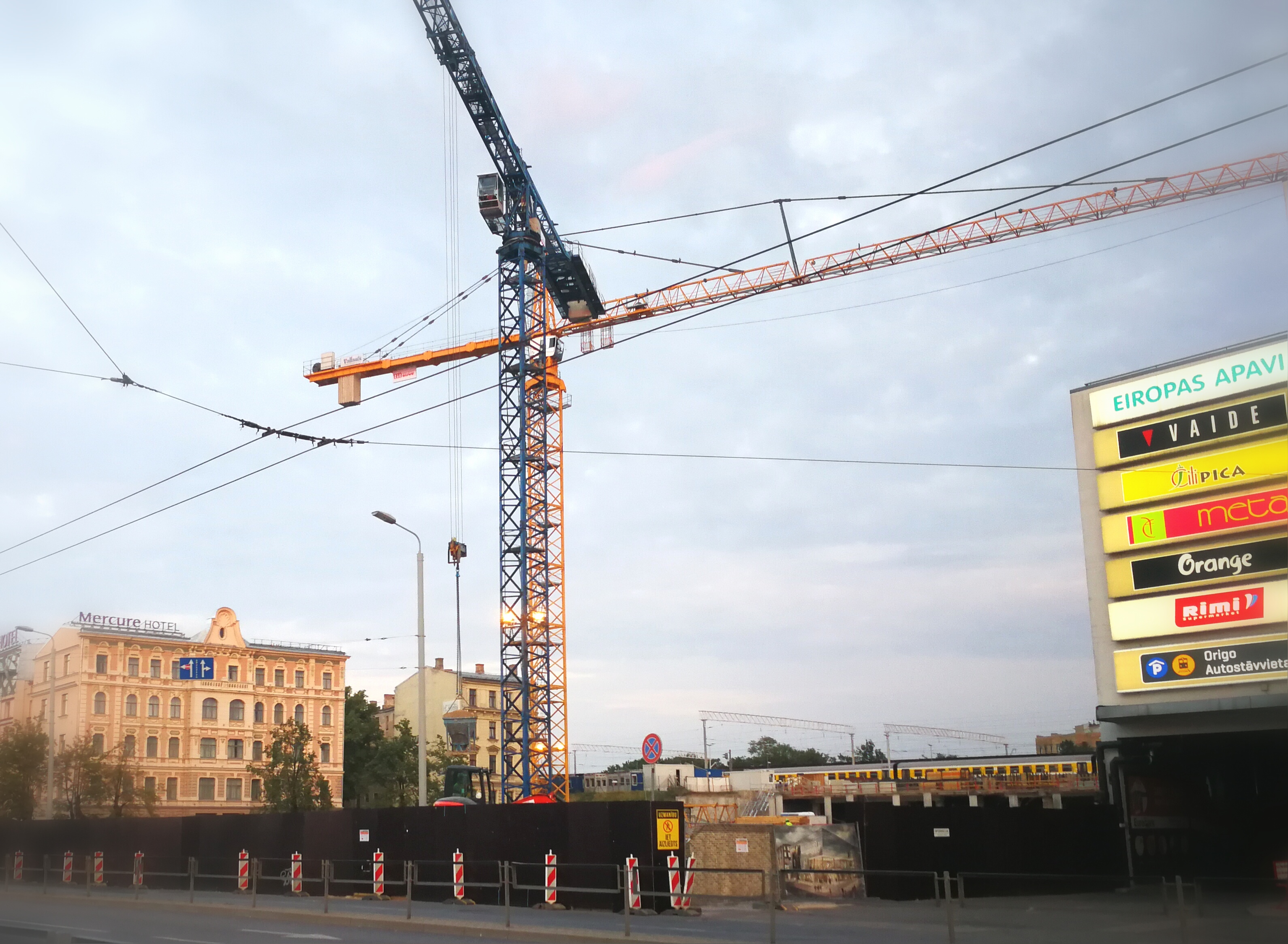 Tirdzniecības centra "Origo" piebūves celtniecība 2018. gada jūlijā.